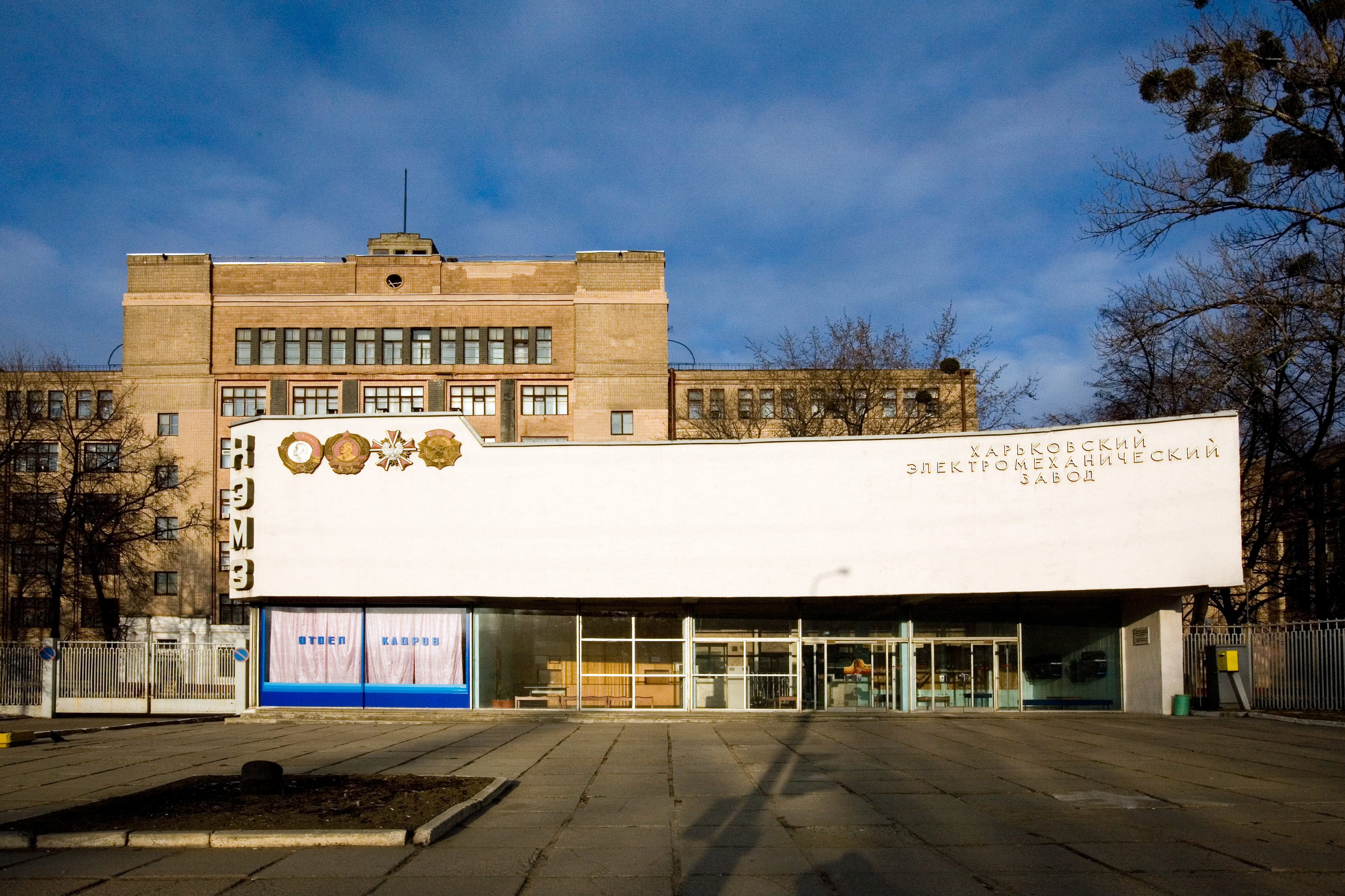 HEMZ Building in Kharkov